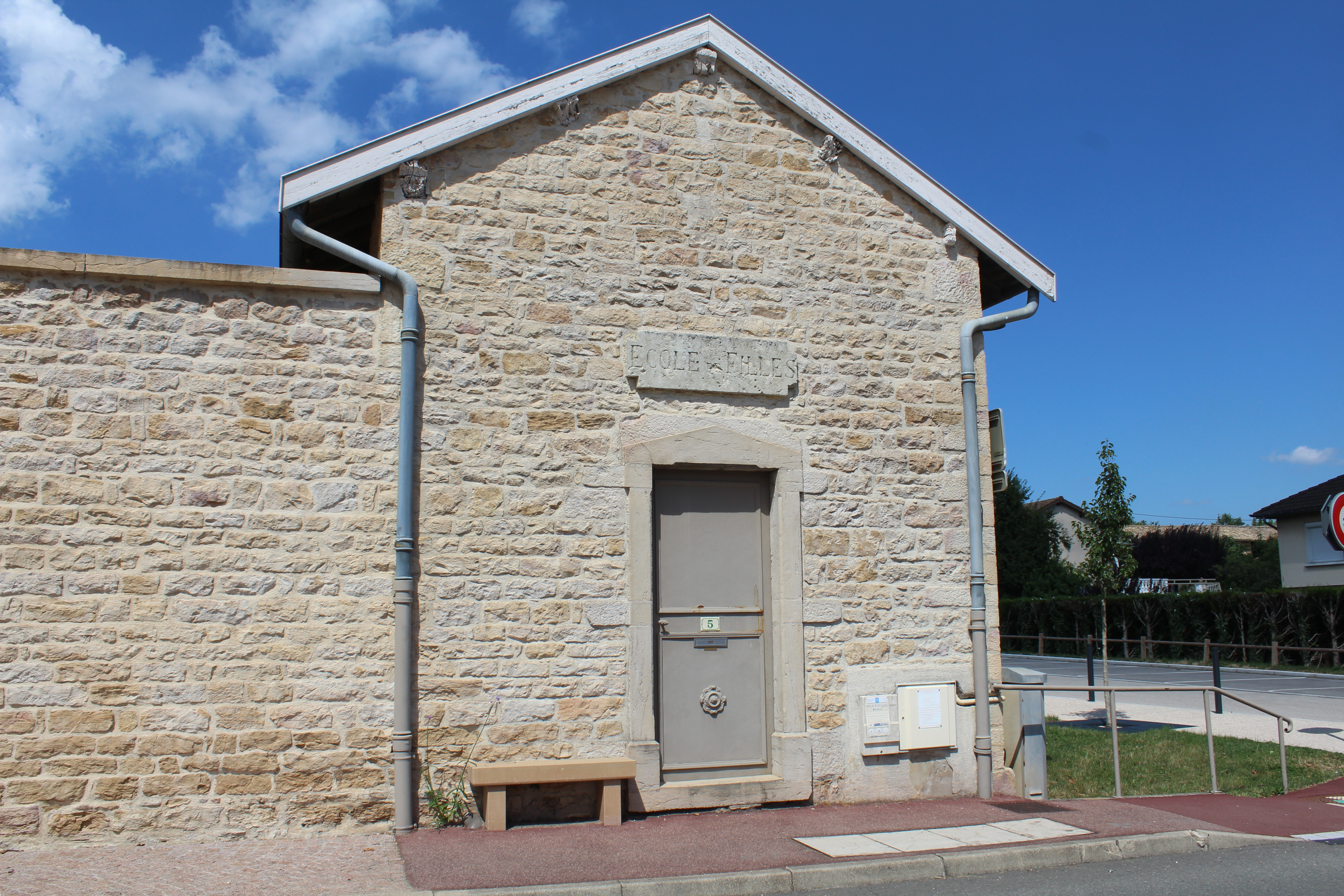 Ancienne école des filles de Sancé.